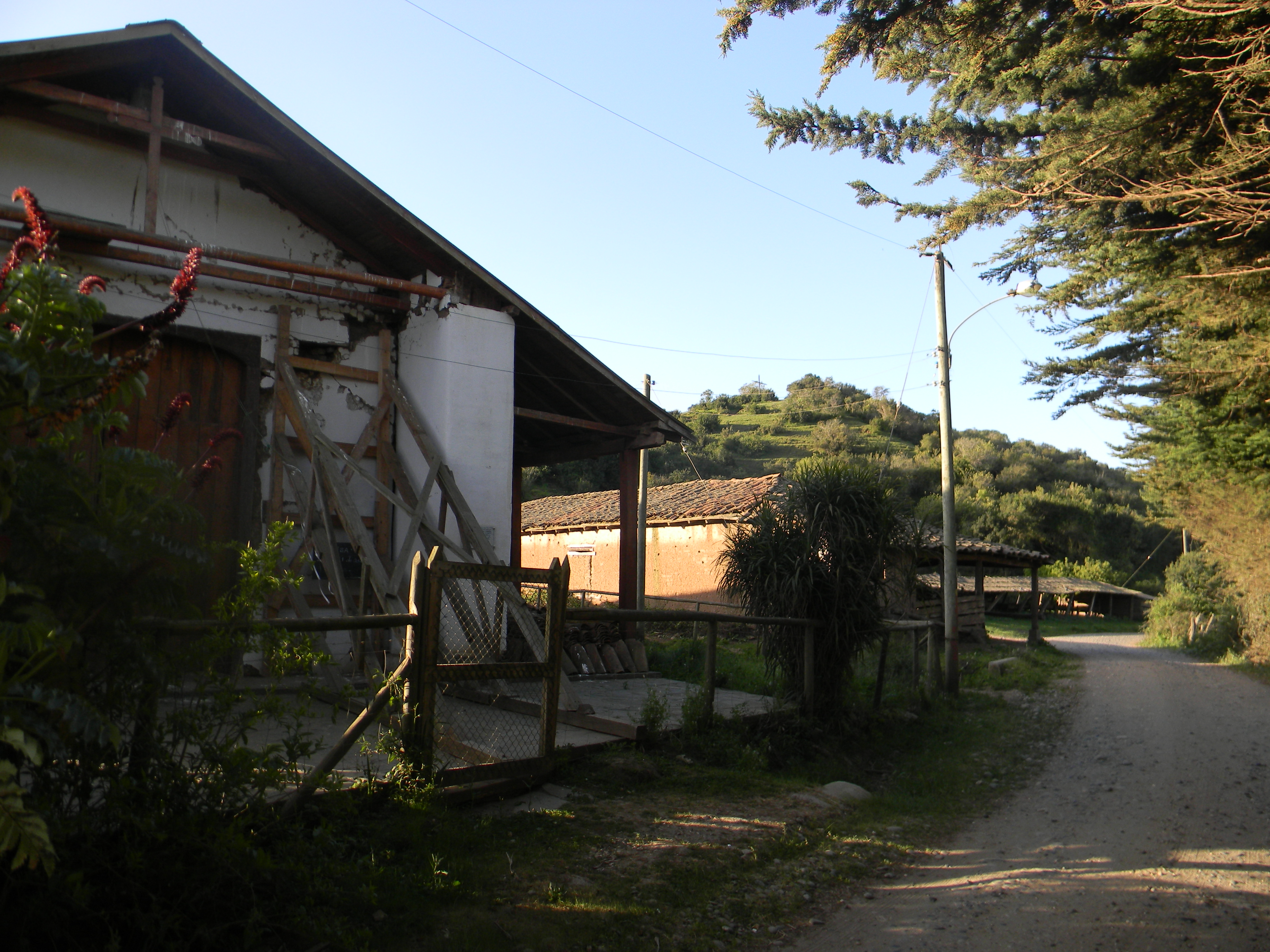 Asentamiento del primer cura misionero llegado a la zona del rió Huenchullamí, Curepto, en 1585 This is a photo of a national monument in Chile: 389